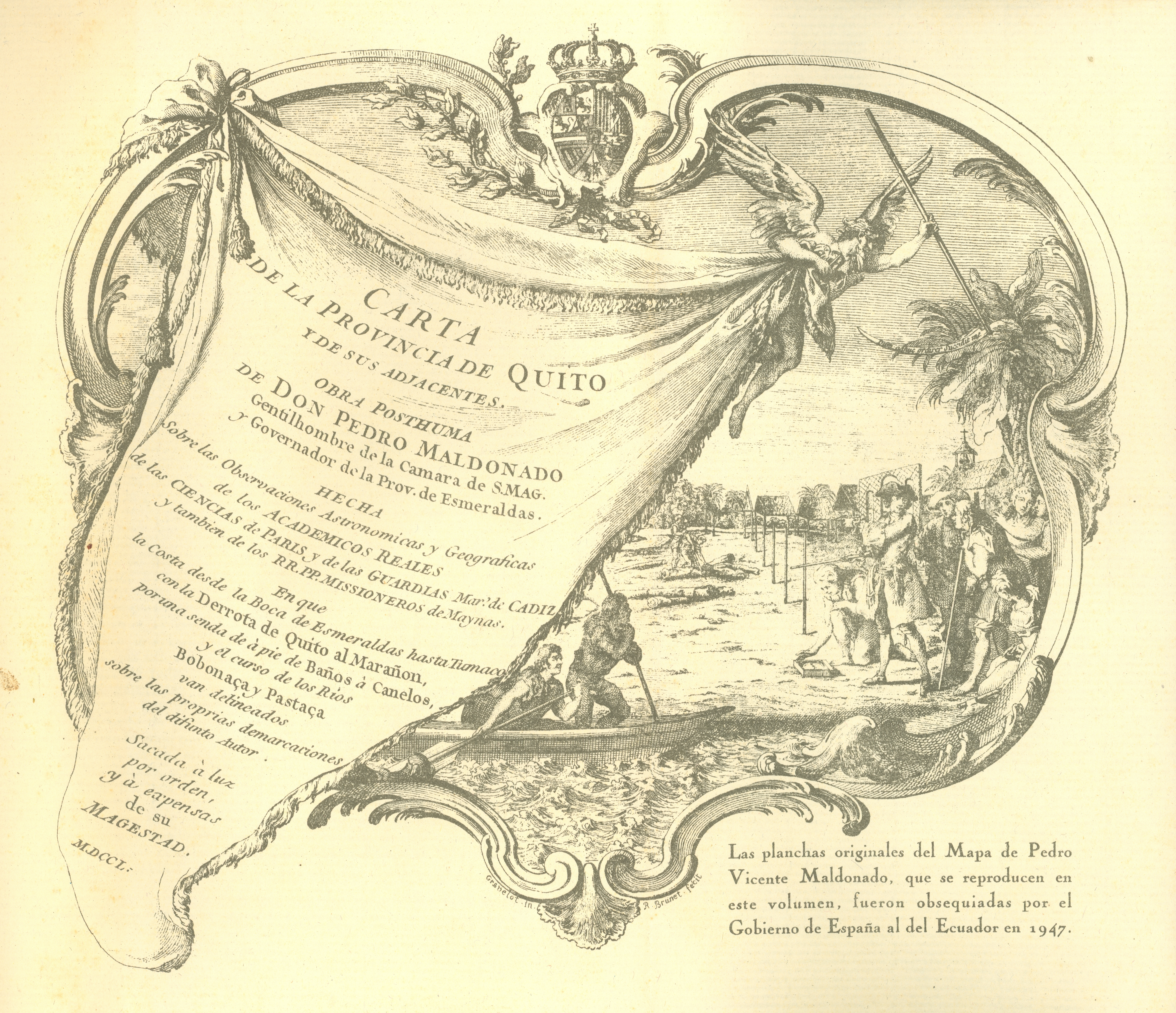 Rumazo Gonzáles, José. (1948). Documentos para la Historia de la Audiencia de Quito / Tomo I: pertenecientes a Pedro Vicente Maldonado – Investigación y compilación por José Rumazo Gonzáles. Talleres Afrodisio Aguado S.A.: Villa y Corte de Madrid, España (12.X.1948). Archivo Histórico del Guayas (AHG); Guayaquil, Ecuador.Consultado y compartido por el usuario J. Javier García A.